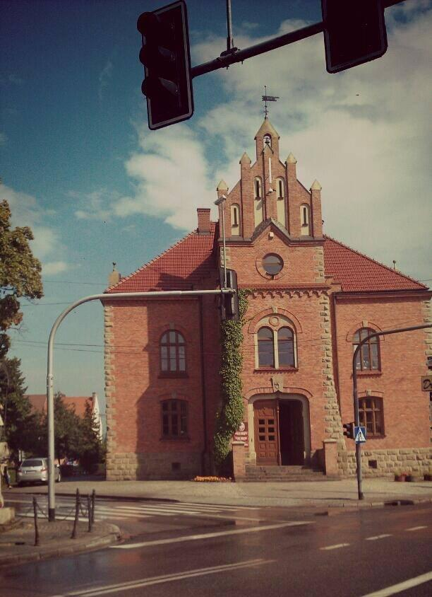 Jordanów, Rynek 1 - ratusz, 1911